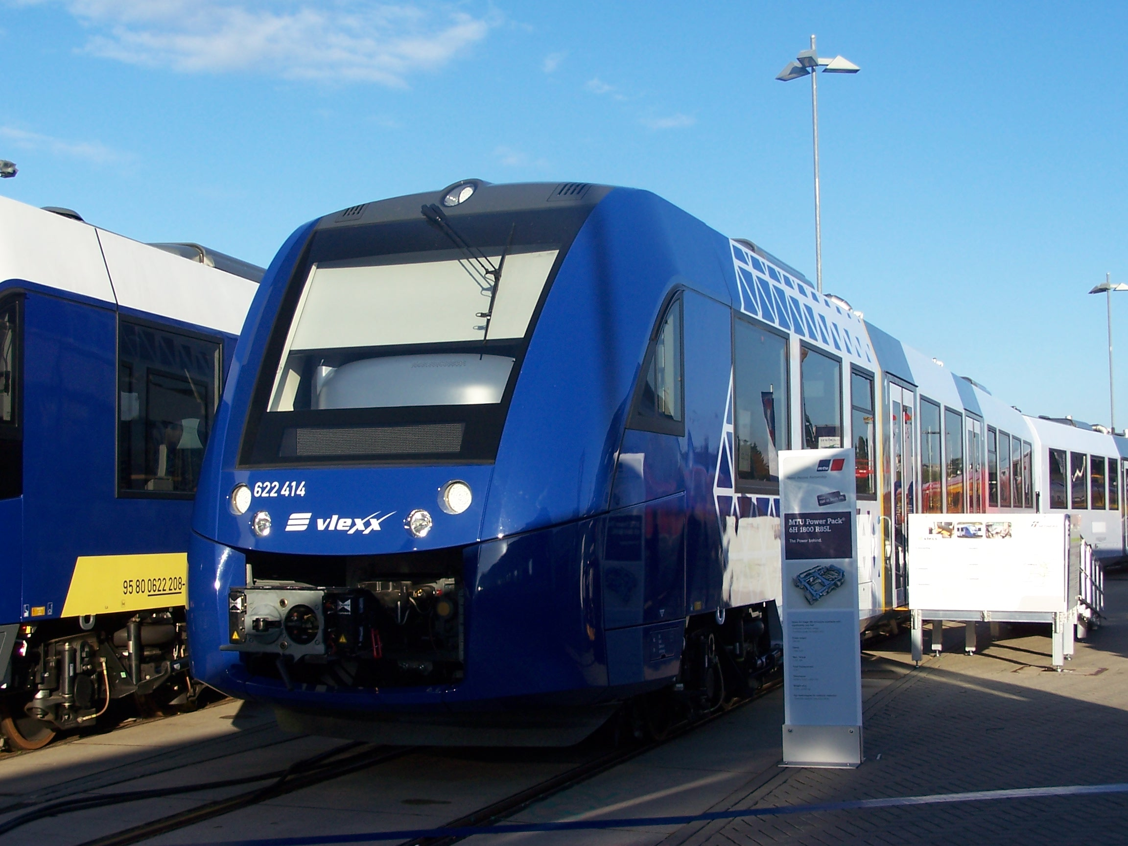 Alstom Coradia LINT 54 der vlexx 622 414 auf der InnoTrans 2014.